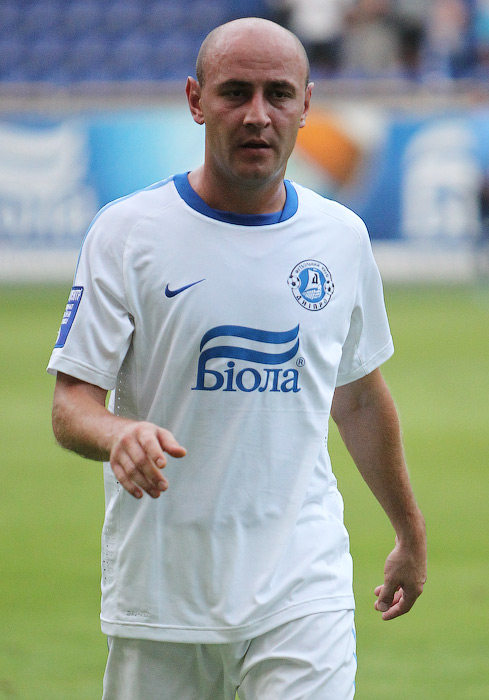 Сергій Назаренко